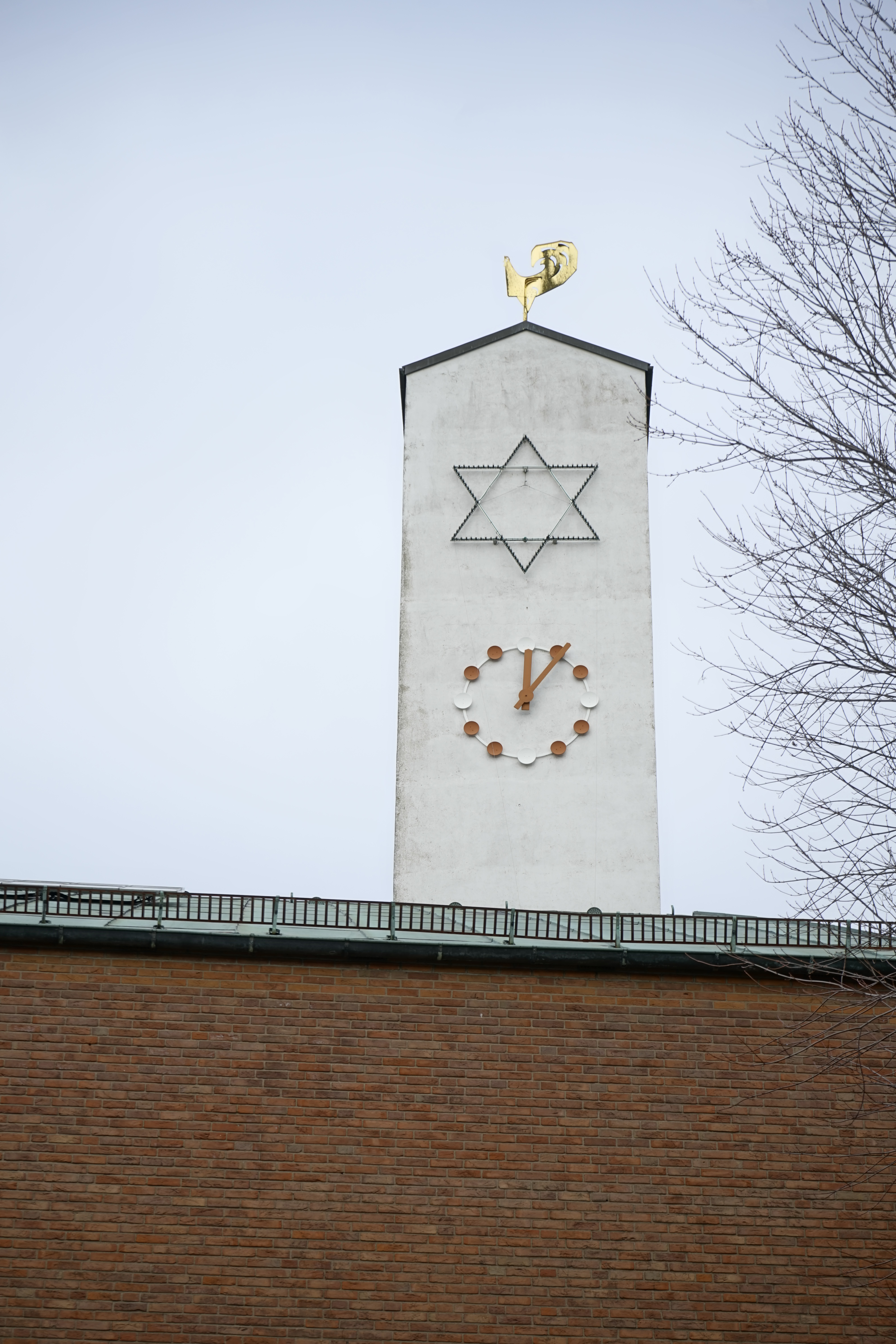 Der Kirchturm der Dreieinigkeitskirche Hof mit Weihnachtsstern. Die Kirchturmuhr geht nach.